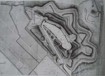 Plan de la forteresse de château de Montrond vers 1650.